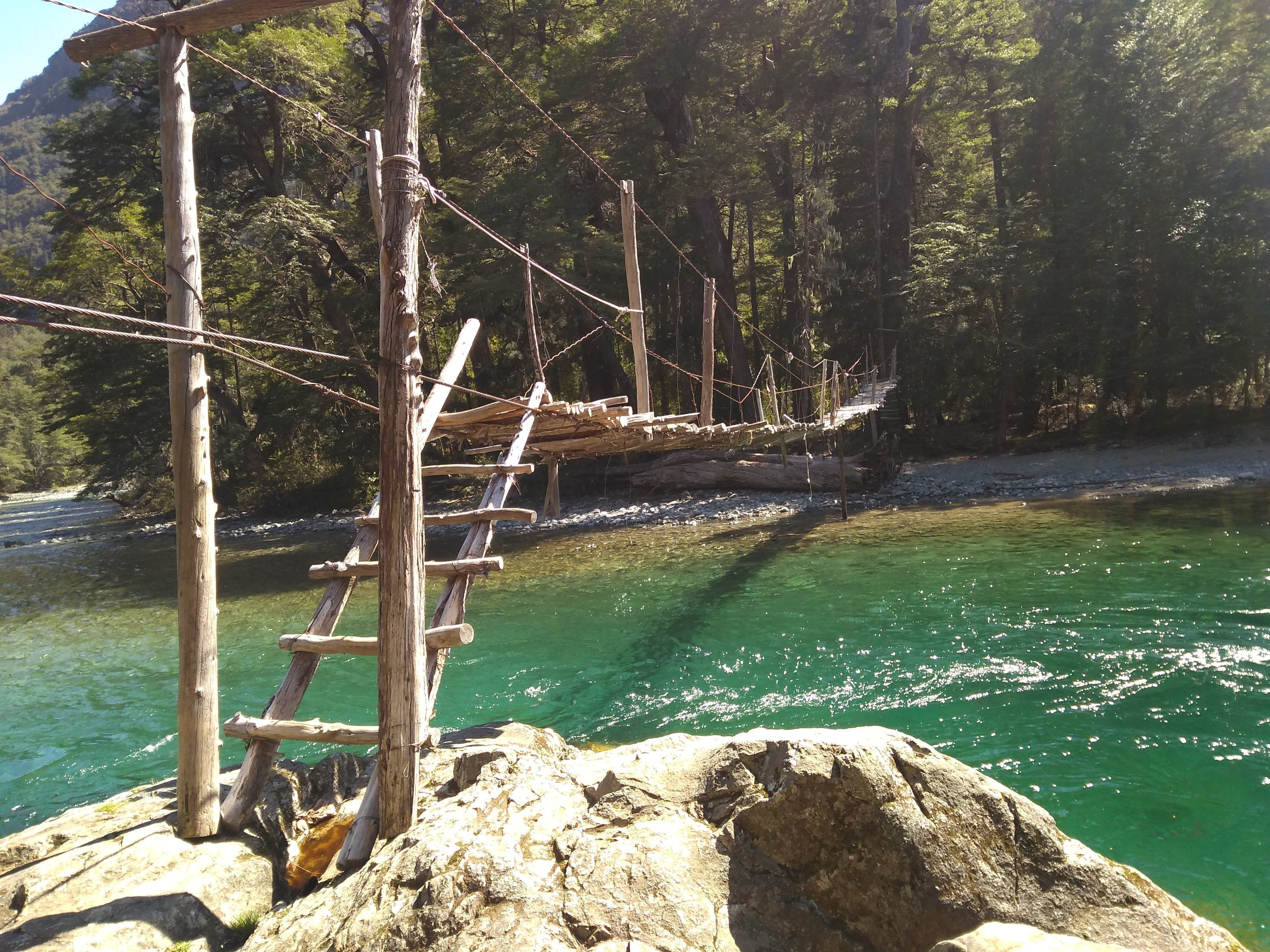 Este puente es el cruce que hay que realizar para acceder al Refugio La Tronconada